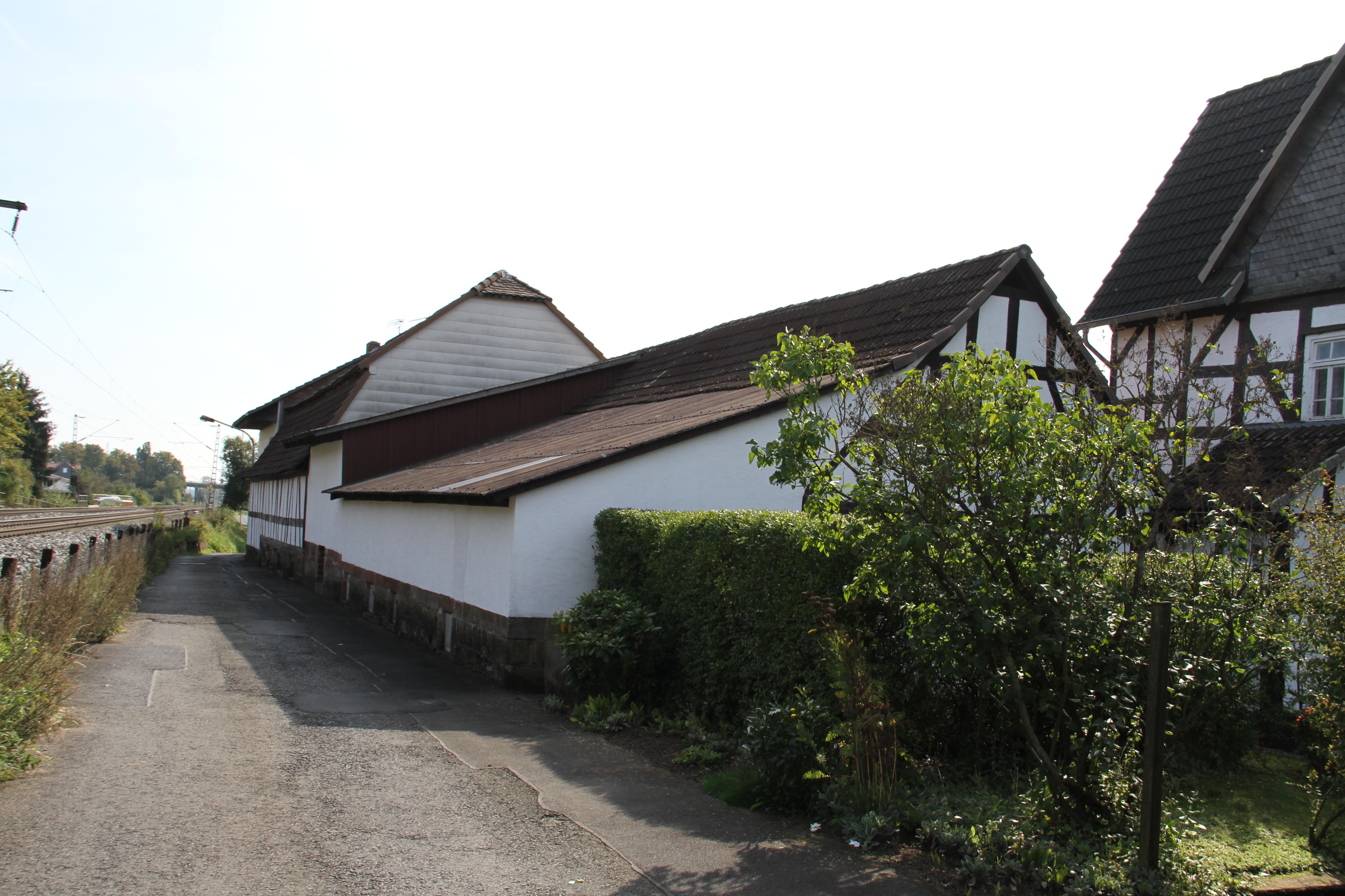 Dieses Foto entstand im Rahmen des Projekts Wiki Loves Monuments Mittelhessen, das aus dem Community-Projektbudget von Wikimedia Deutschland e. V. gefördert wurde.